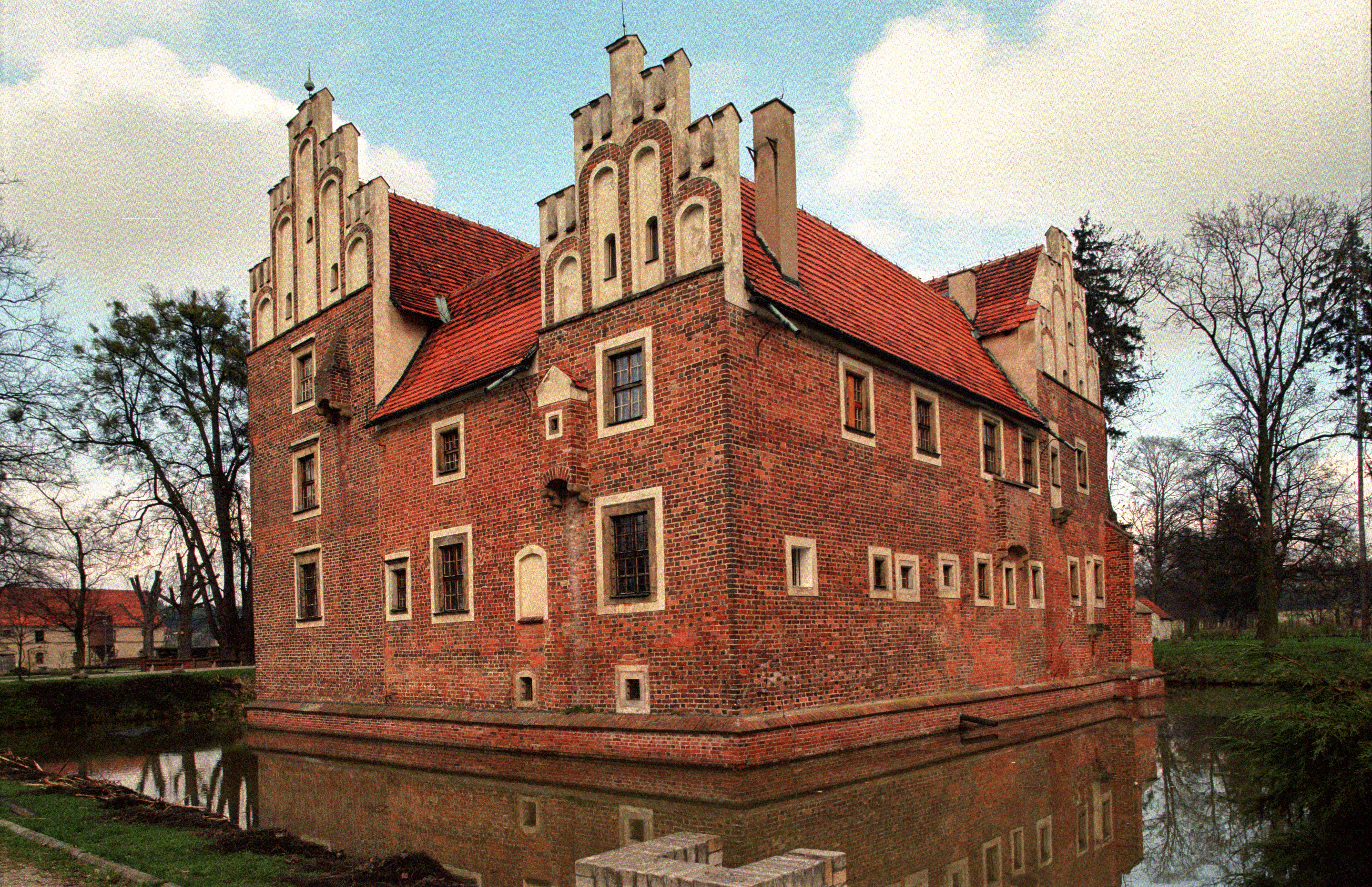 Poland, Wojnowice Castle